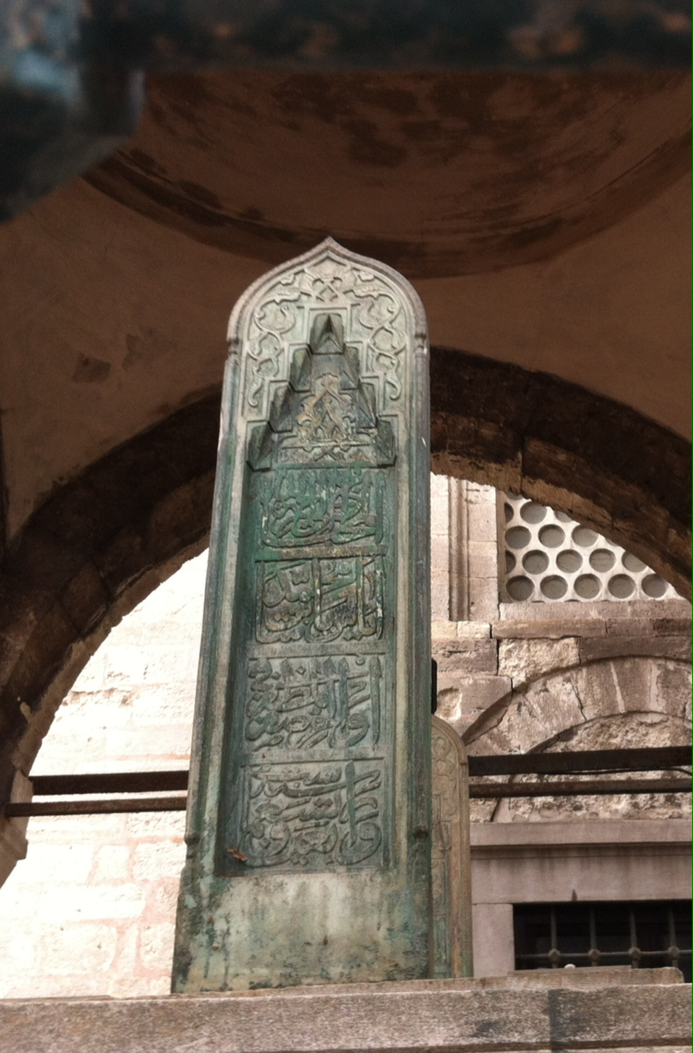 Ayas Mehmed Paşa Mezar Taşı